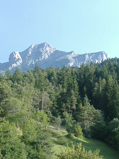 Montagne du chapeau de Gendarme vue depuis le quartier de la Chaup à Barcelonnette, le 16 août 2006